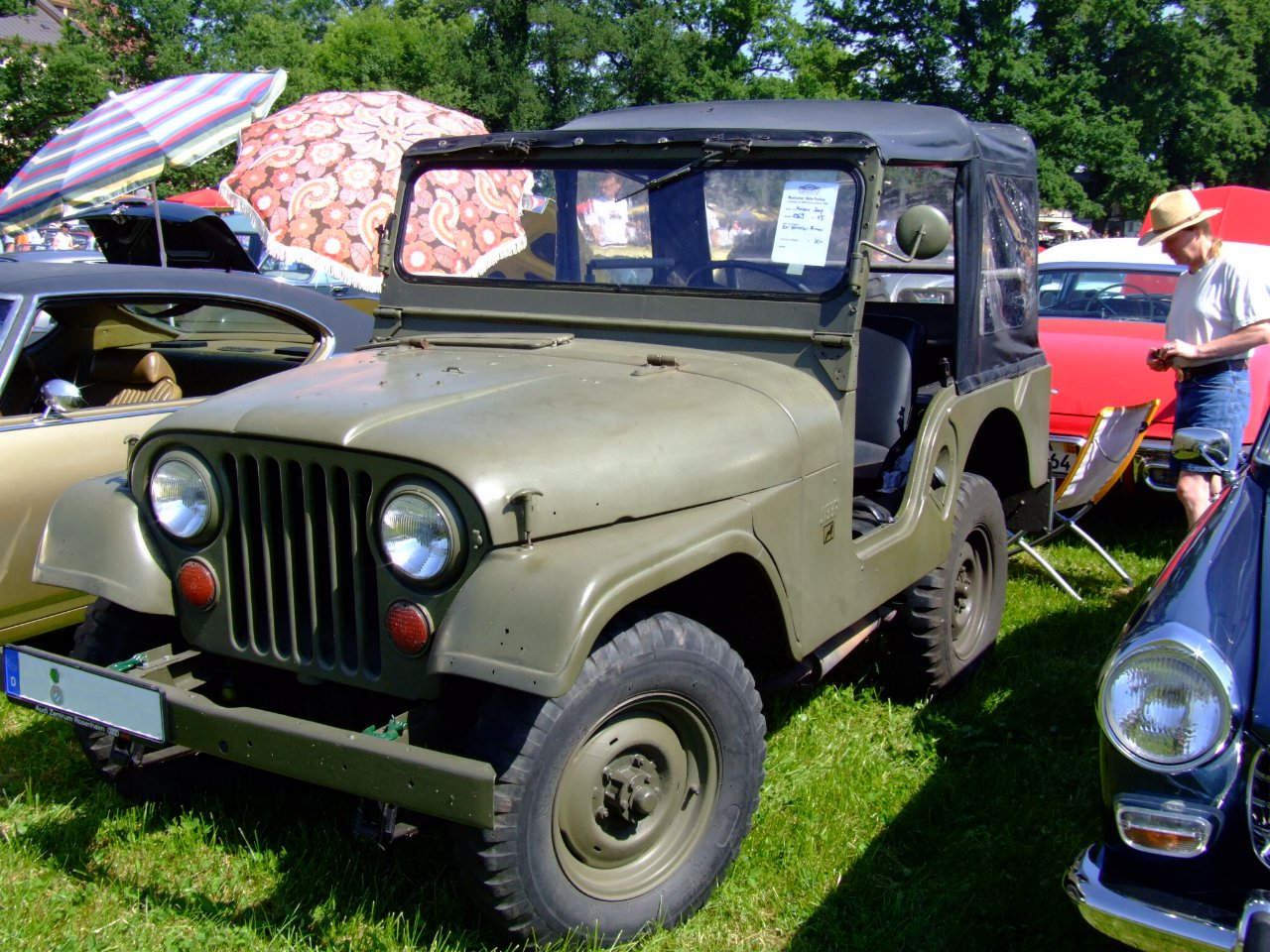 Kaiser Jeep Bj.: 1969 PS: 75 Ex-Schweizer Armee Fahrzeug